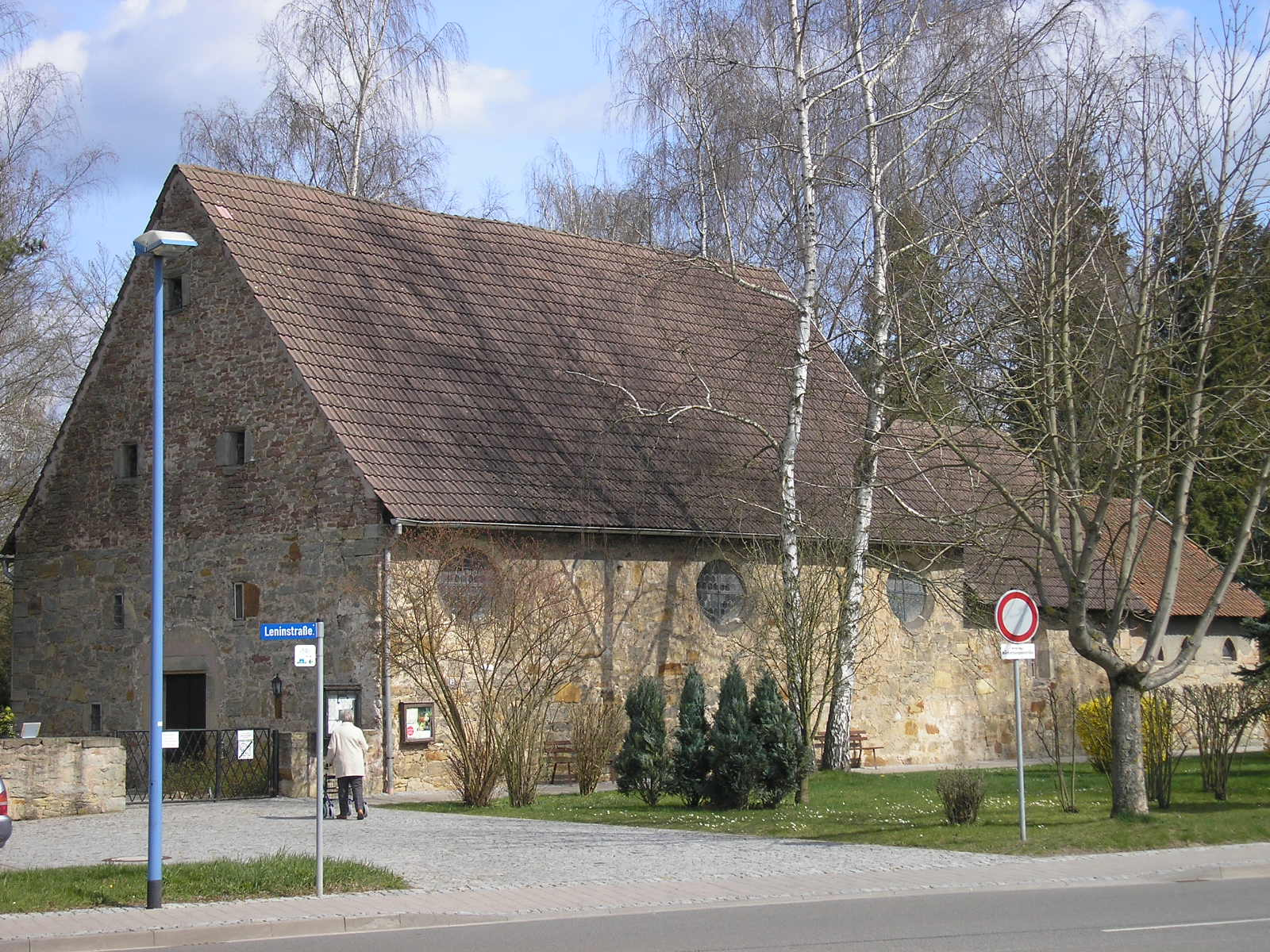 Die Friedhofskirche in Themar (Thüringen).